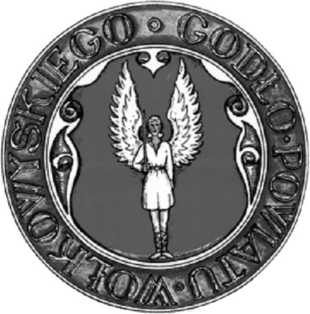 Беларуская (тарашкевіца): Герб Ваўкавыскага павету (Vaŭkavyski paviet)